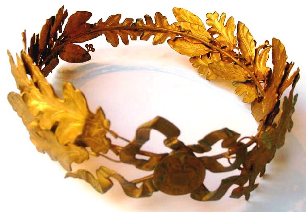 couronne de lauriers